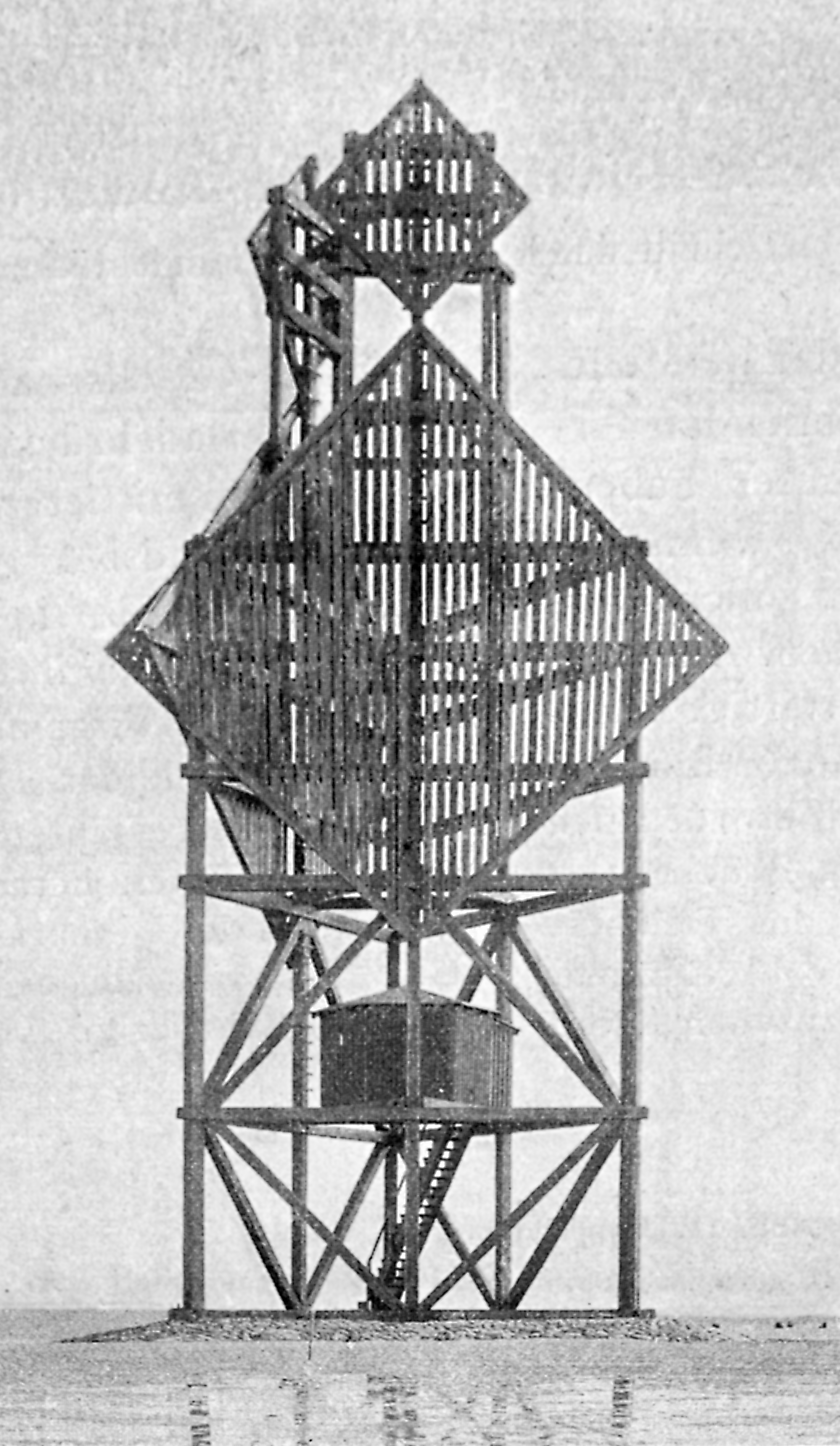 Scharhörnbake, erbaut 1898, niedergelegt 1914. (Fotovorlage, leicht perspektivisch korrigiert)